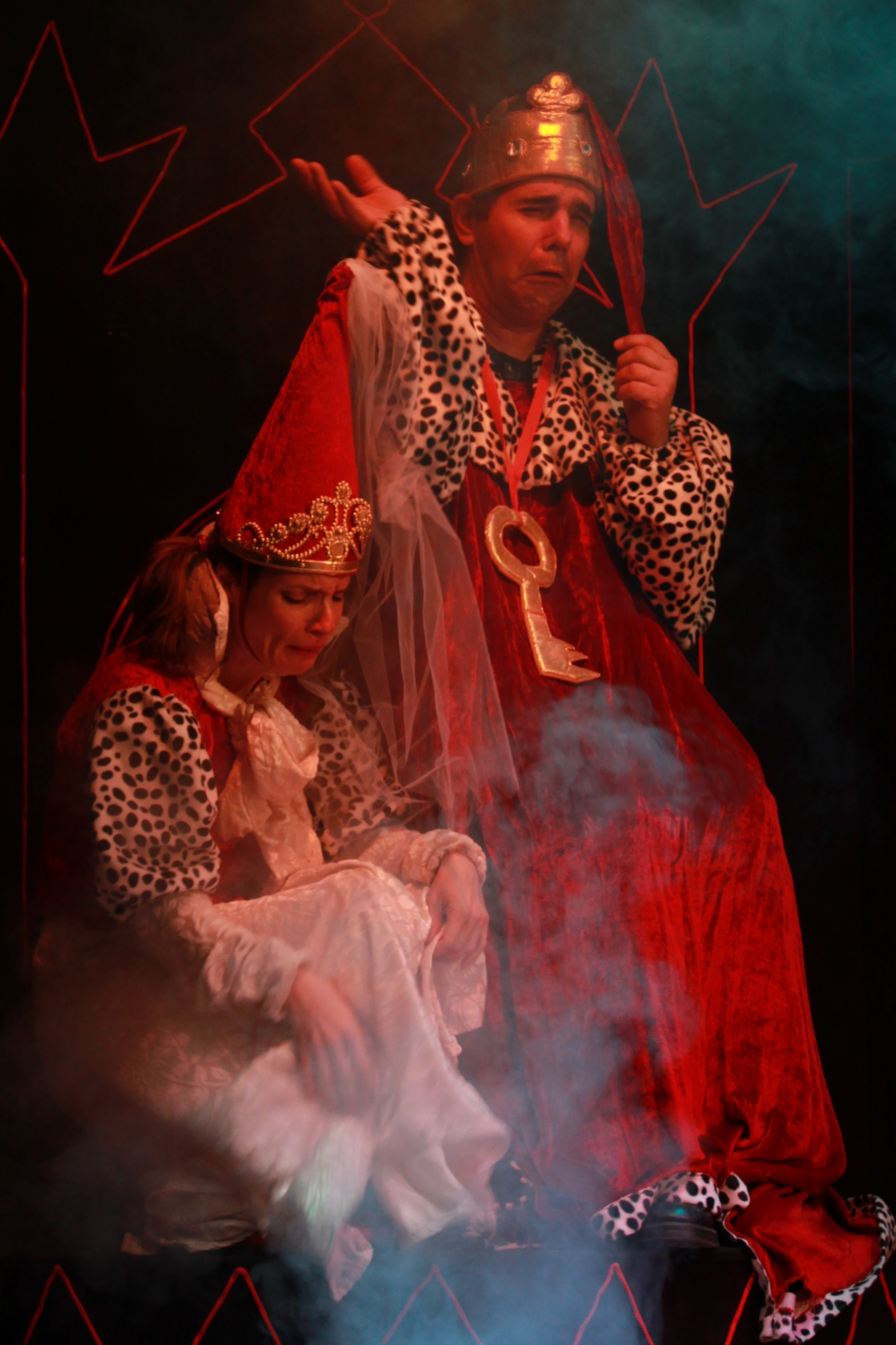 2 אישקטן ודרקון תיאטרון החאן 2011 (בתמונה - חנוך רעים ואליאן דבאל)